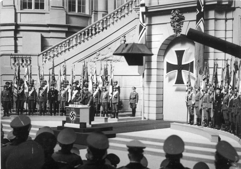 Der Heldengedenktag der Nation In heroischer und stolzer Trauer beging am Sonntag das deutsche Volk das Gedenken seiner gefallenen Helden. Der Staatsakt in Berlin erhielt seine hohe Weihe durch die Gegenwart des Führers. Im Zeughaus, der Ruhmesstätte preussisch-deutscher Geschichte neigte sich der Führer und mit ihm das ganze deutsche Volk in Ehrfurcht vor den unsterblichen Helden des Krieges. Nach der Ansprache begab sich der Führer ins Ehrenmal und legte hier einen Kranz für die Gefallenen nieder. Dann begrüßte er vor dem Ehrenmal Verwundete des ersten Weltkrieges und dieses Krieges. Darauf erfolgte der Vorbeimarsch eines Ehrenbataillons, das aus je einer Kompanie des Heeres, der Kriegsmarine, der Luftwaffe und der Waffen-SS zusammengesetzt war und das unter dem Kommando des Ritterkreuzträgers Oberstleutnant Gehrke stand. UBz.: den Führer während seiner Ansprache im Zeughaus. 1472-43